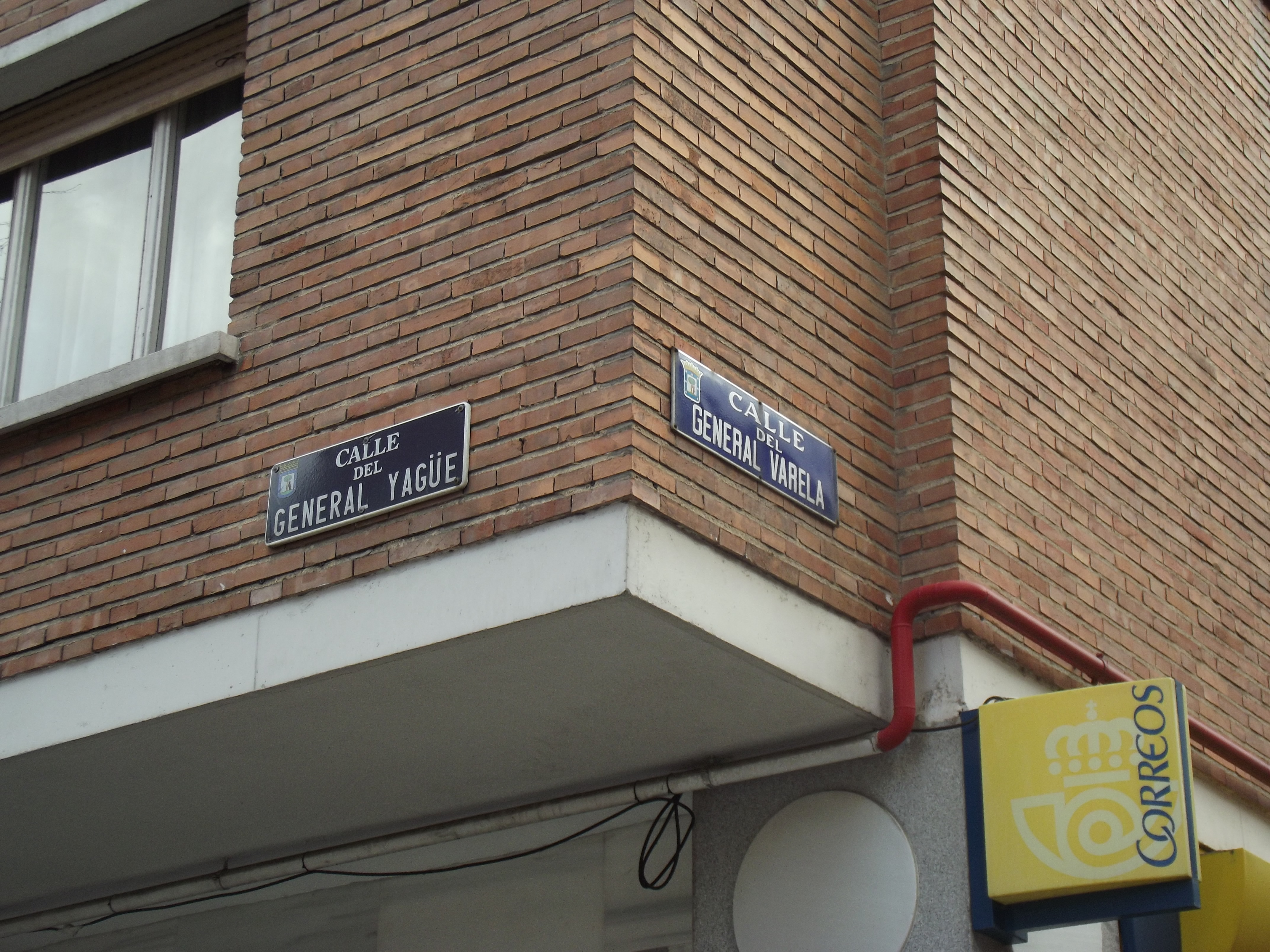 Esquina de las calles General Yagüe y General Varela, Madrid